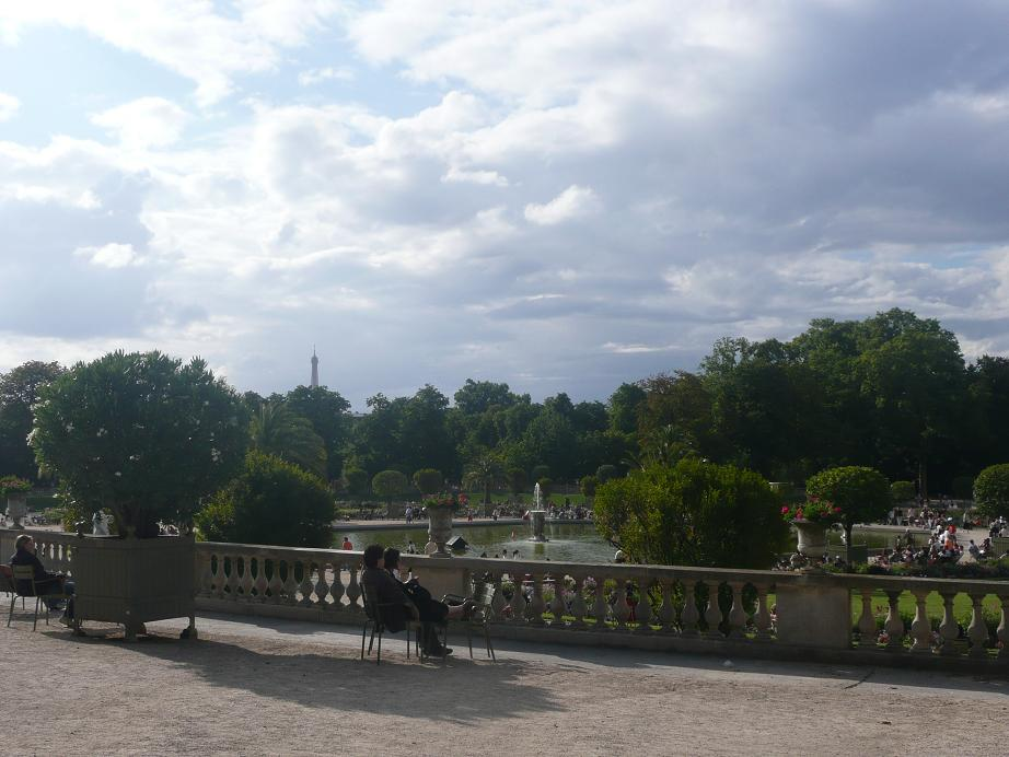 Terrasse du Fer à Cheval du Jardin du Luxembourg, VIe arrondissement, Paris, France.